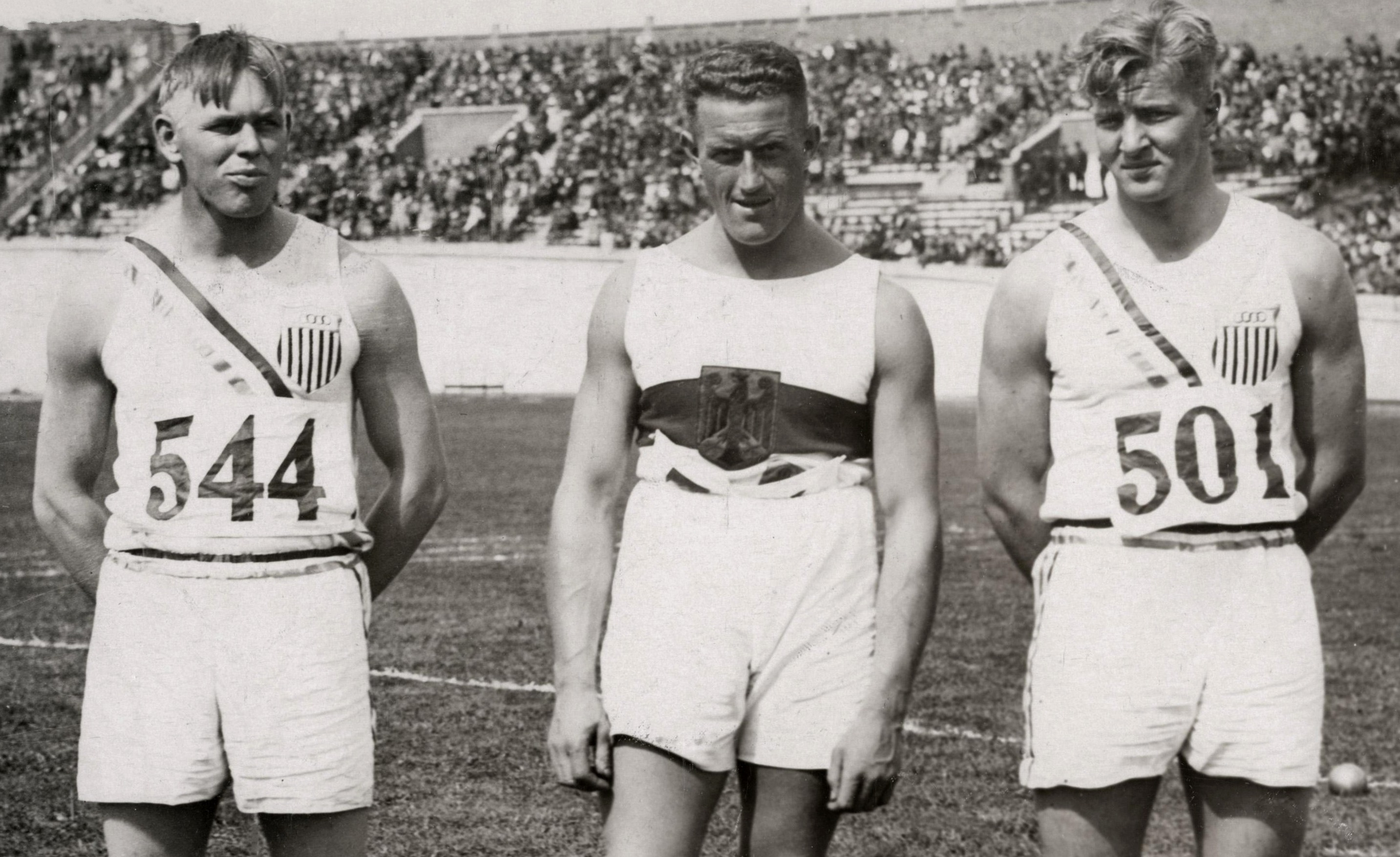 Sport, Olympische Spelen Amsterdam, 1928 : Kogelstoten : Vlnr John Kuck, olympisch kampioen, Emil Hirschfeld, derde, en Herman Brix (Bruce Bennett), tweede.